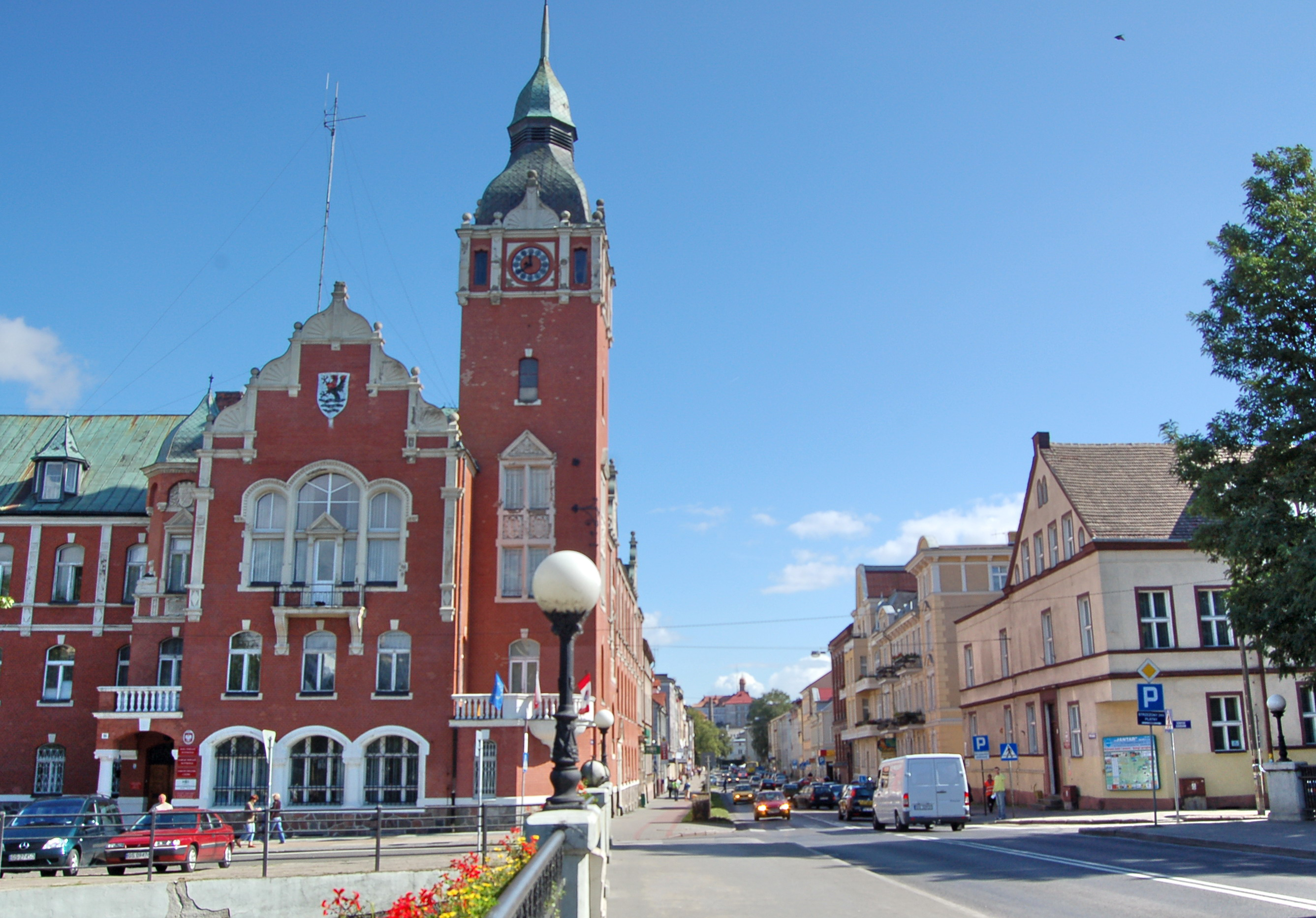 Słupsk, Starostwo Powiatowe